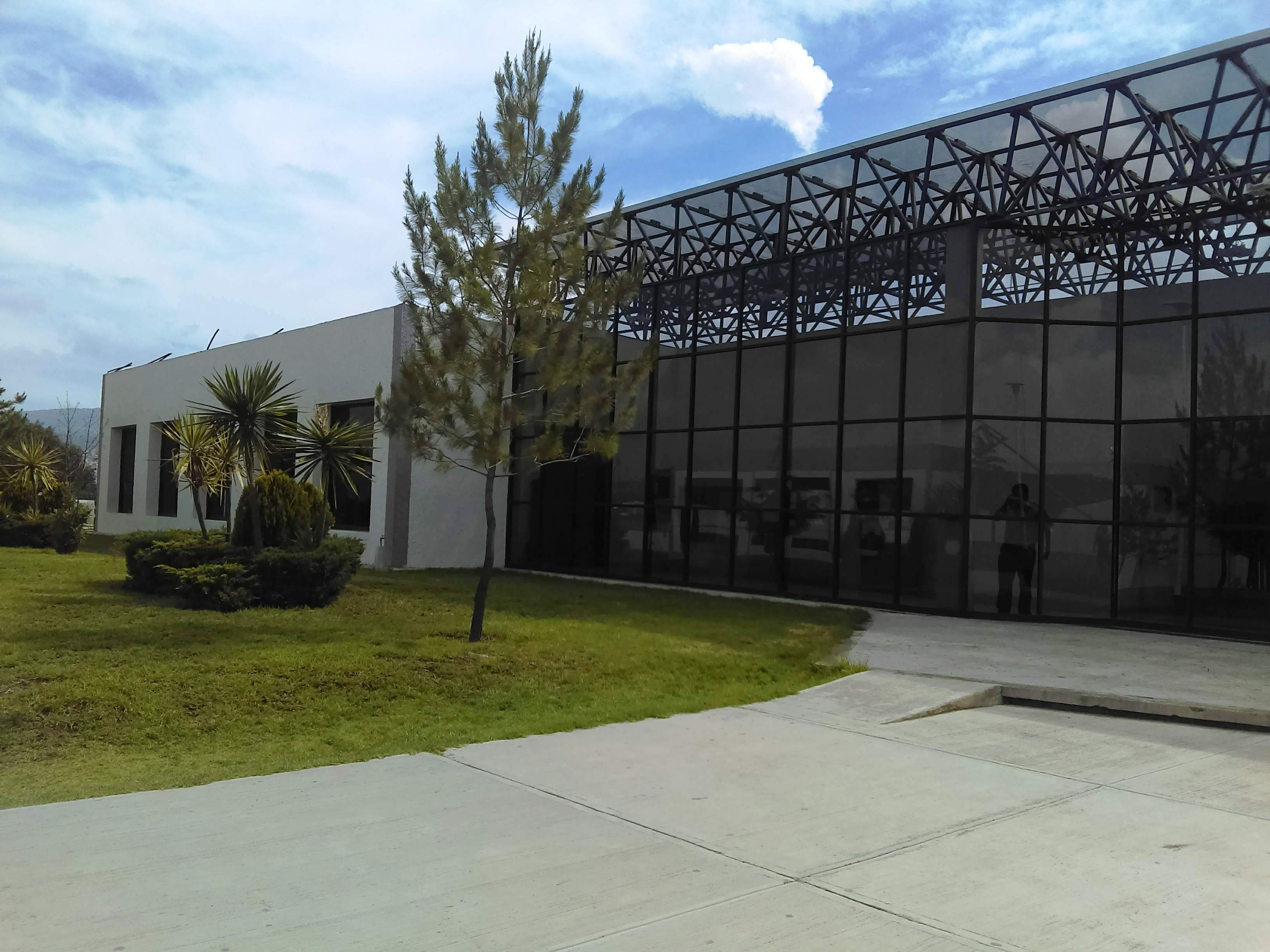 Ciudad del Conocimiento de la UAEH.